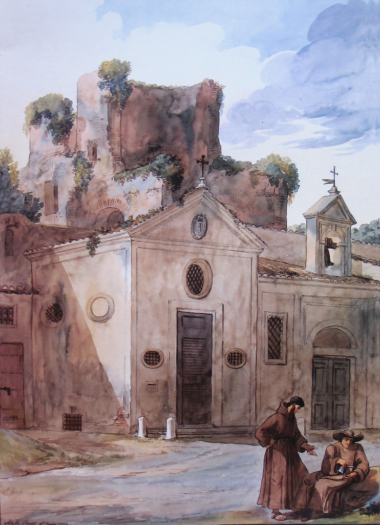 Chiesa distrutta di Santa Maria dei Cerchi